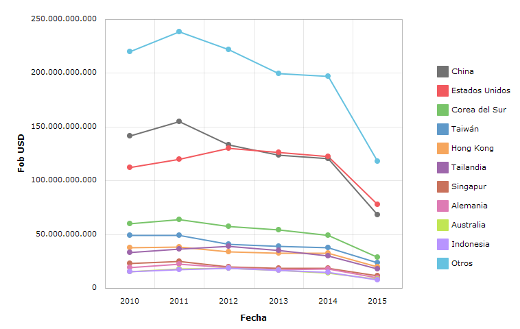 Exportaciones de Japón del periodo 2010-hasta agosto 2015 expresadas en USD valor FOB.